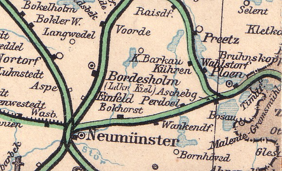 Bahnstrecke Neumünster-Ascheberg